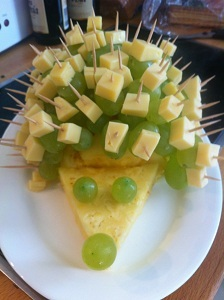 Käseigel für kalte Platten und Kalte Büfetts